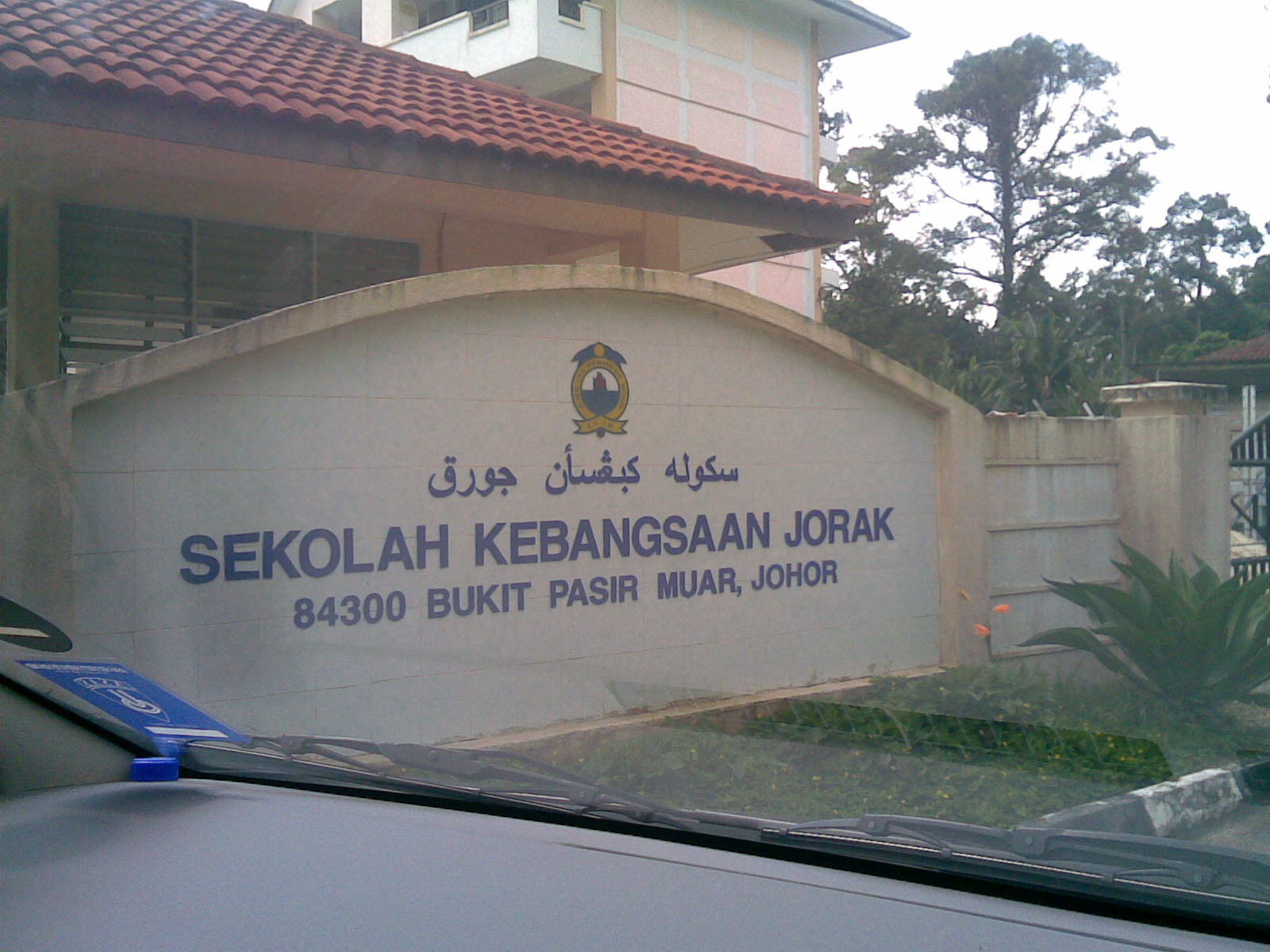 Sekolah Kebangsaan Jorak, Johor, Malaysia.